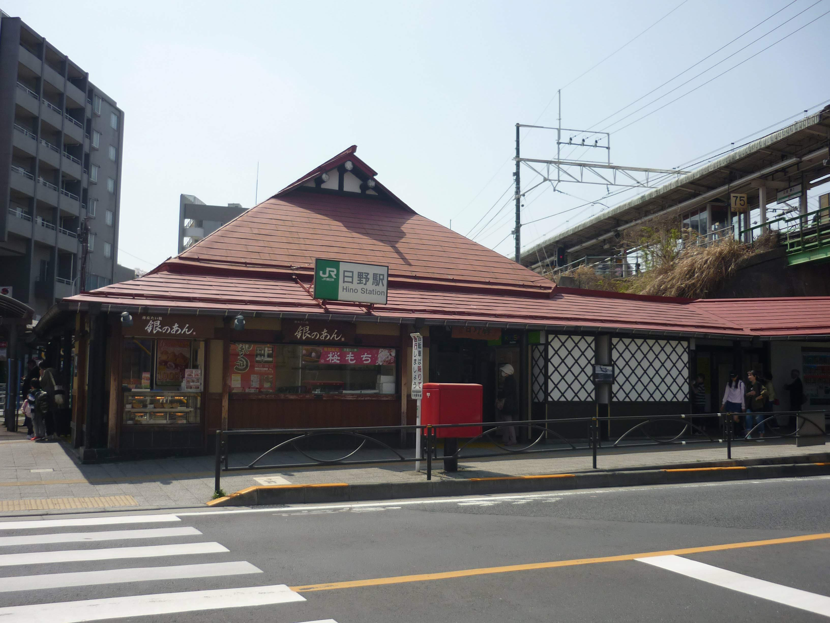 JR日野駅